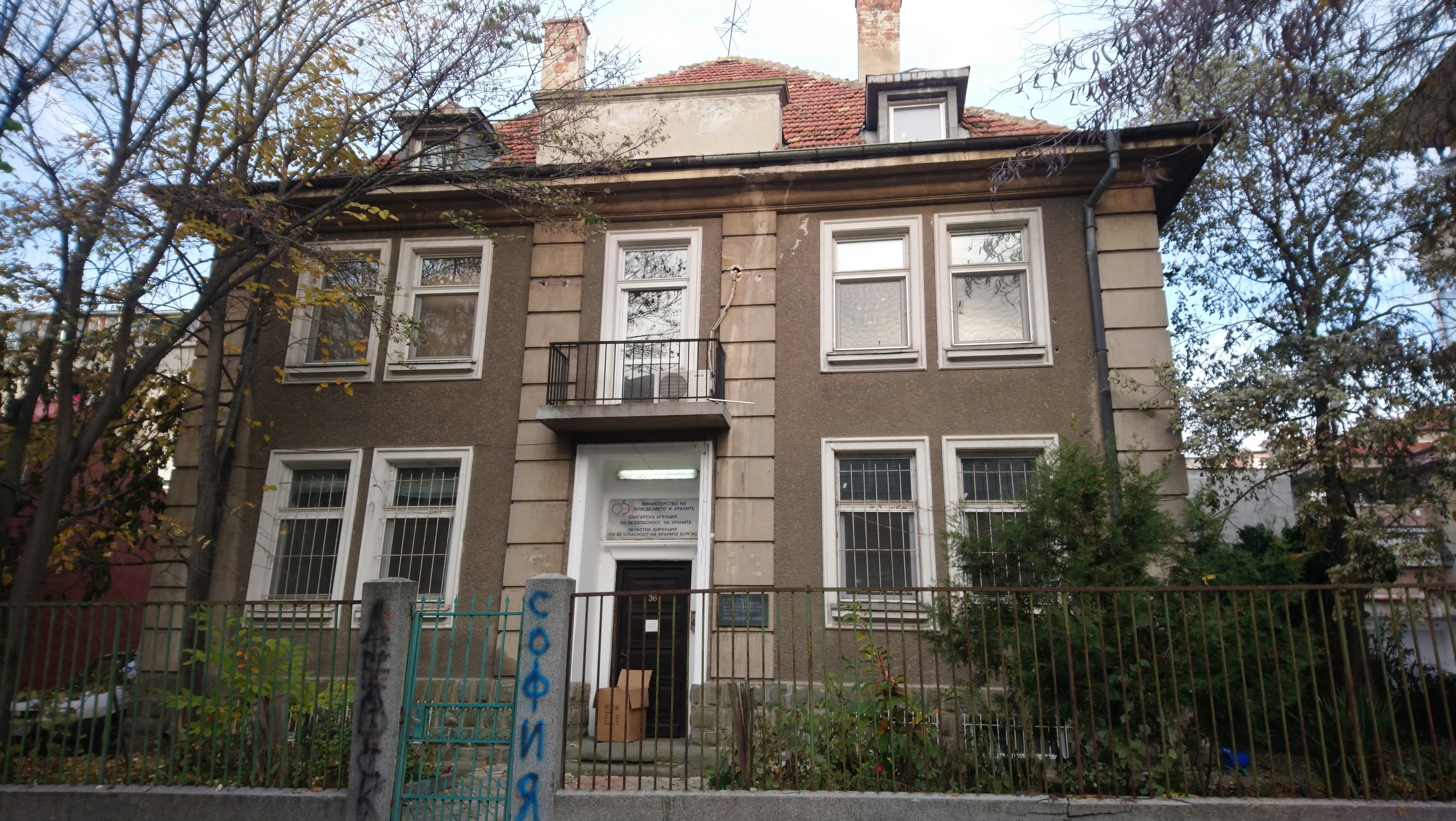 Областната дирекция по безопасност на храните в Бургас, ул. Хан Аспарух 36 с паметната плоча на писателя Димитър Димов.